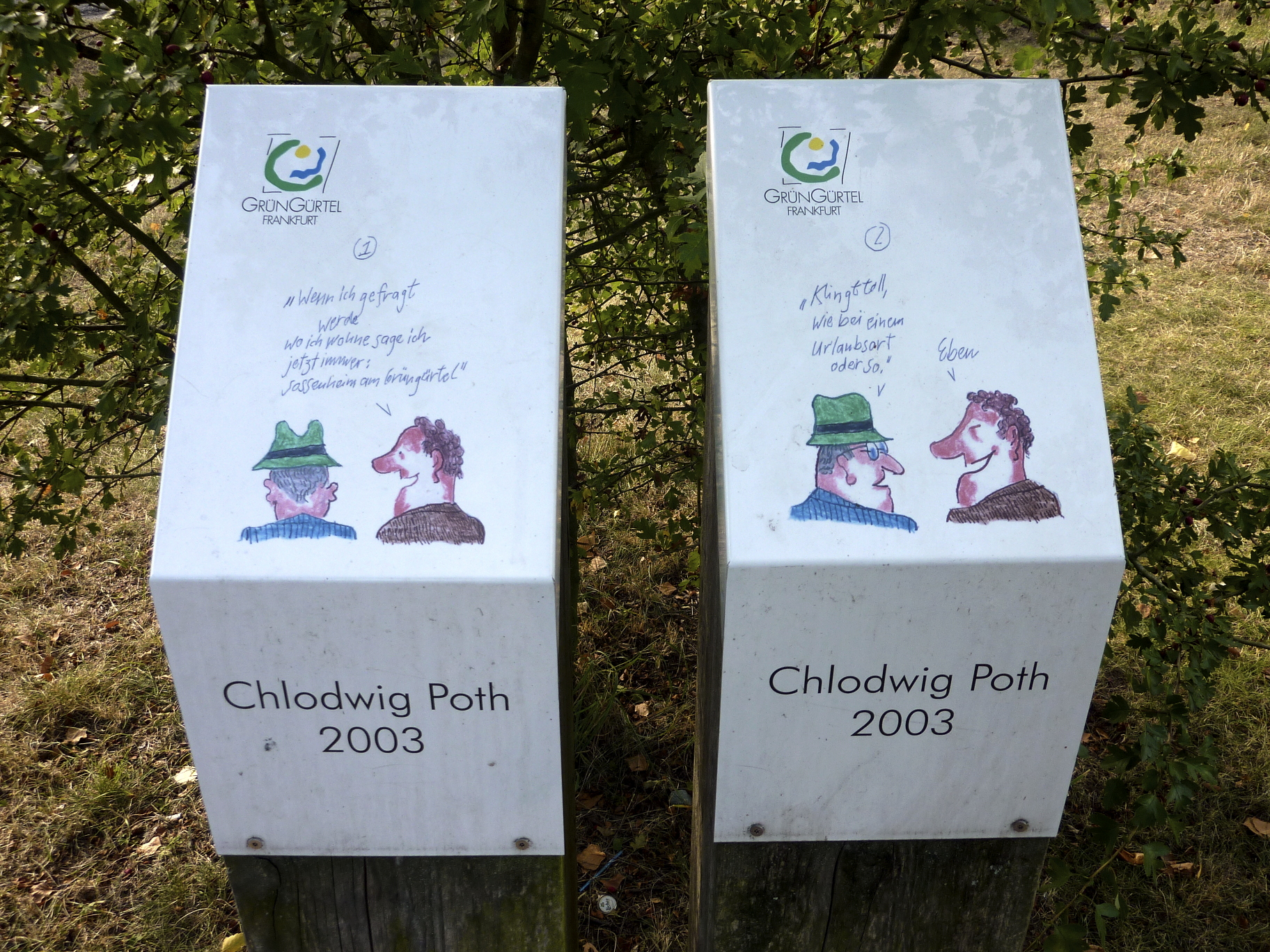 Frankfurt am Main: Im westlichen Stadtteil Sossenheim erinnert die im Jahr 2006 eingerichtete Chlodwig-Poth-Anlage an den in Sossenheim ansässigen Zeichner und Schriftsteller (1930–2004). Die Anlage liegt südlich des Ortsrandes im Sossenheimer Unterfeld im Frankfurter Grüngürtel. Vor Ort sind zwei von Poth gezeichnete Bildfolgen ausgestellt. Das Foto zeigt die Stelen mit der Bildfolge „Sossenheim am Grüngürtel“, Chlodwig Poth 2003